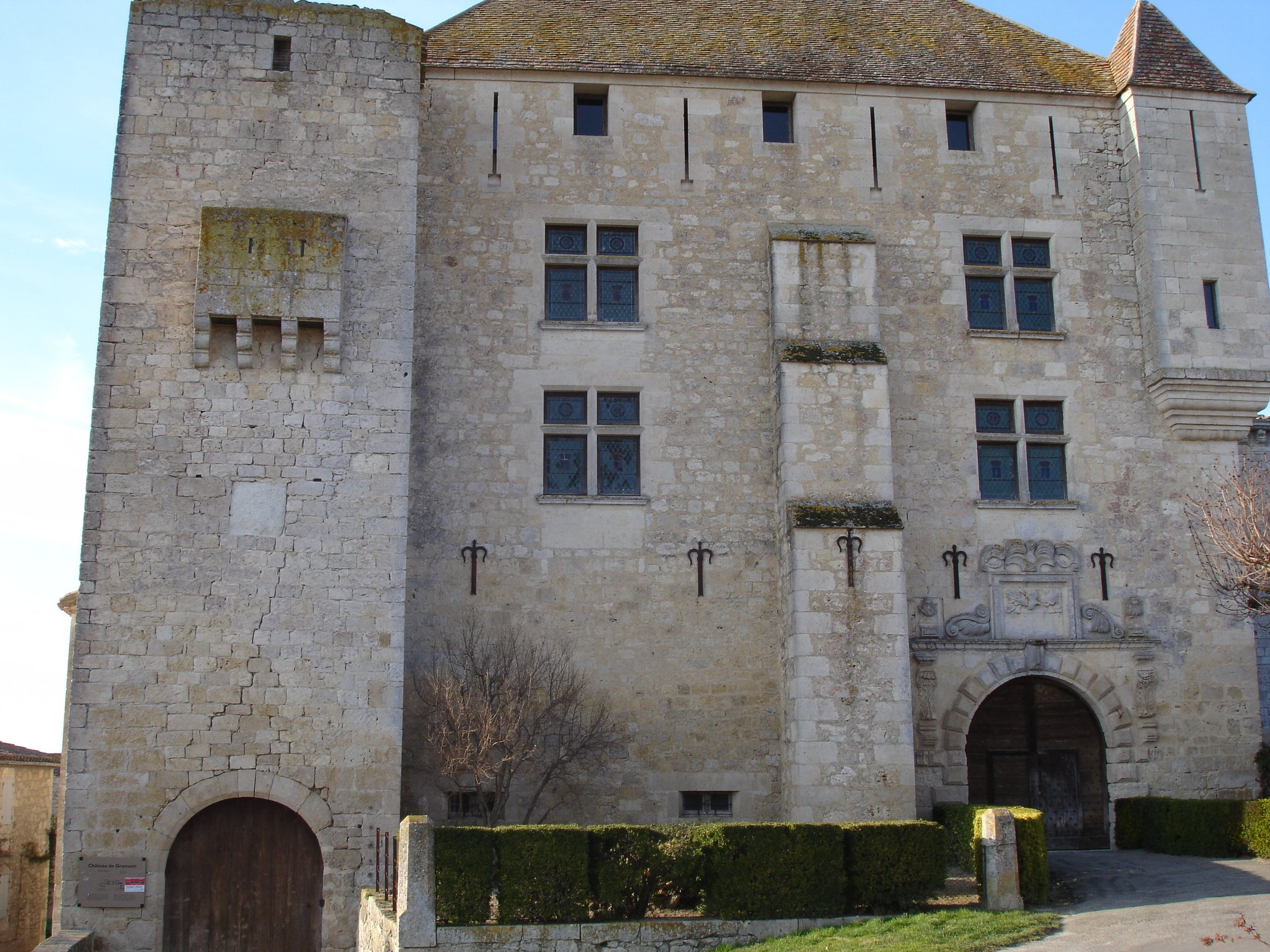 France - Gramont(82) - Château de Gramont